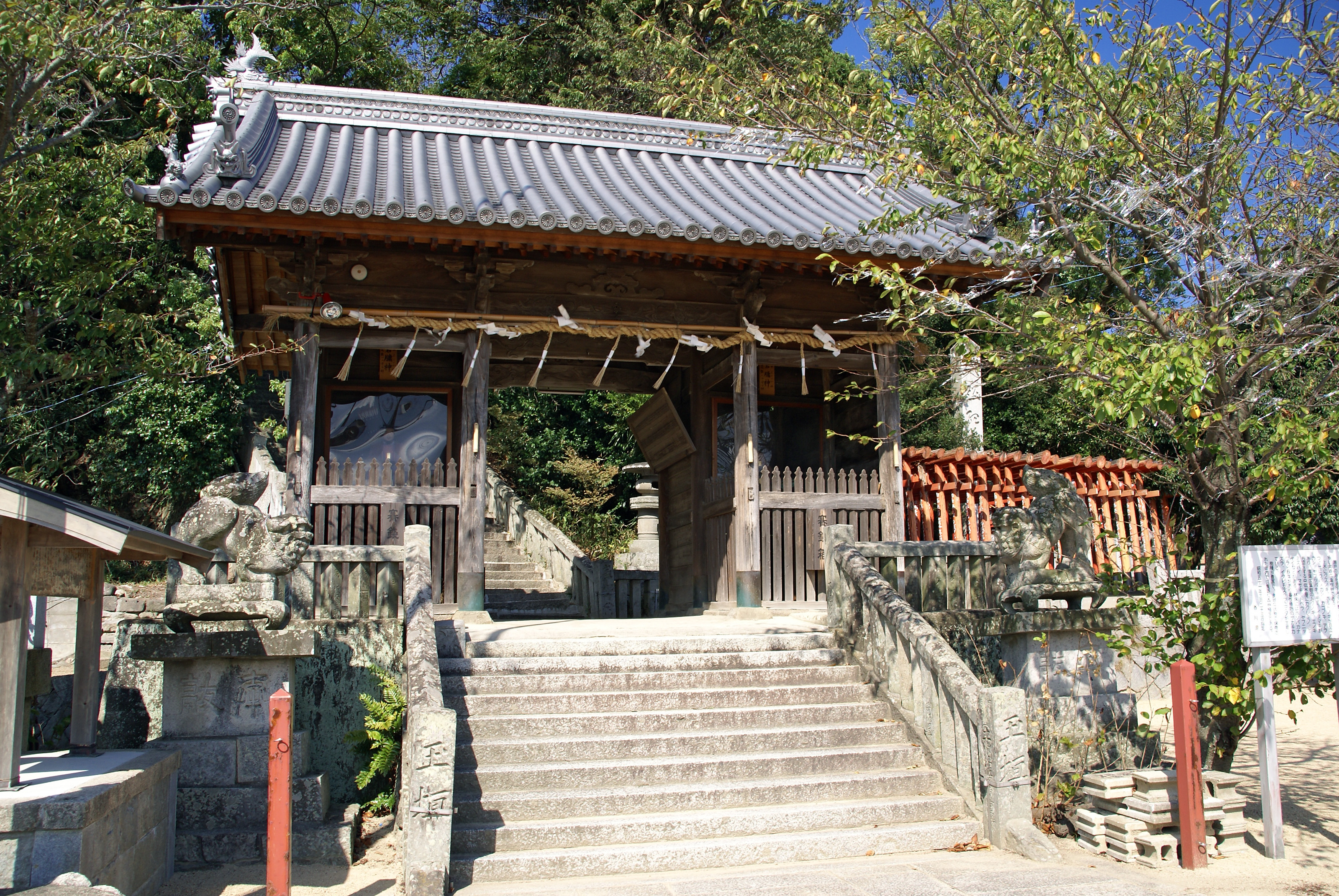 Honda-hachiman-jinja in Hiketa, Higashikagawa, Kagawa prefecture, Japan